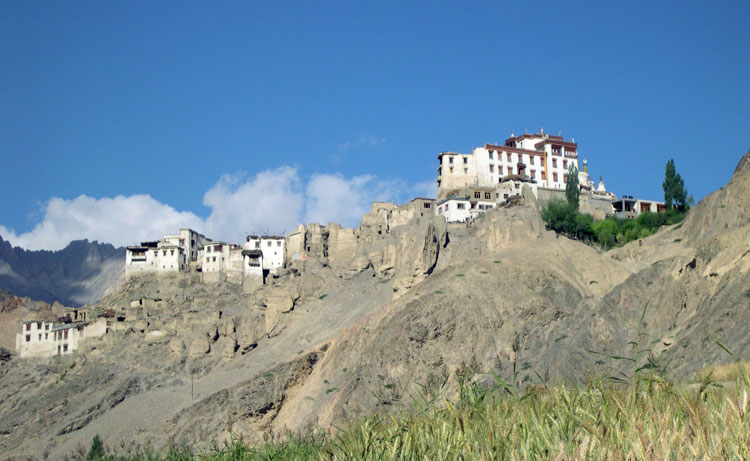 Monestir o Gompa de Lamayuru, a Ladakh, estat de Jammu i Caixmir, Índia